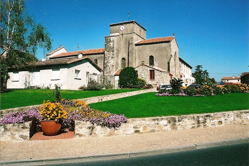 Français